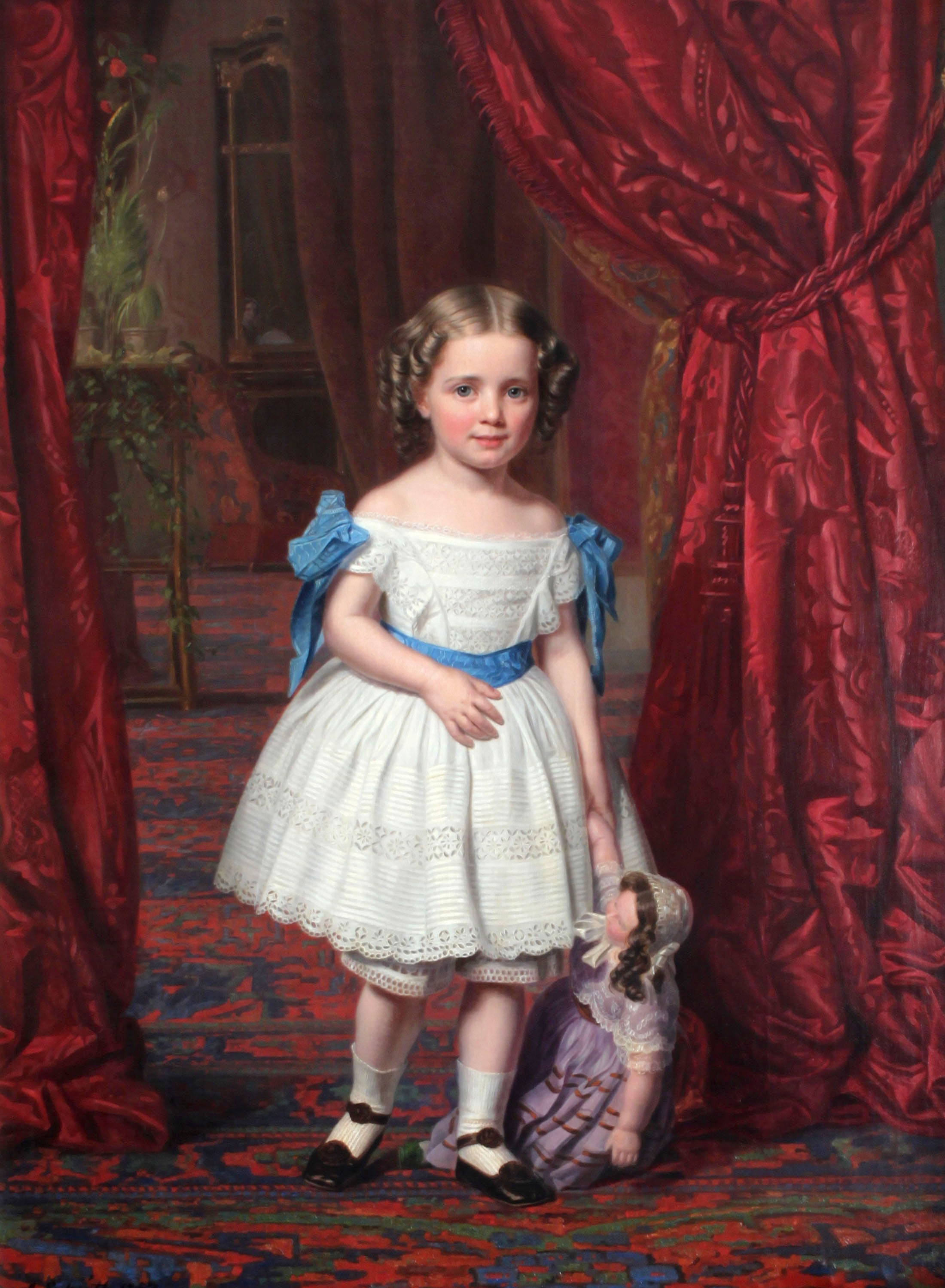 Prinsesse Thyra af Danmark , malet i hel figur af August Schiøtt i 1857.